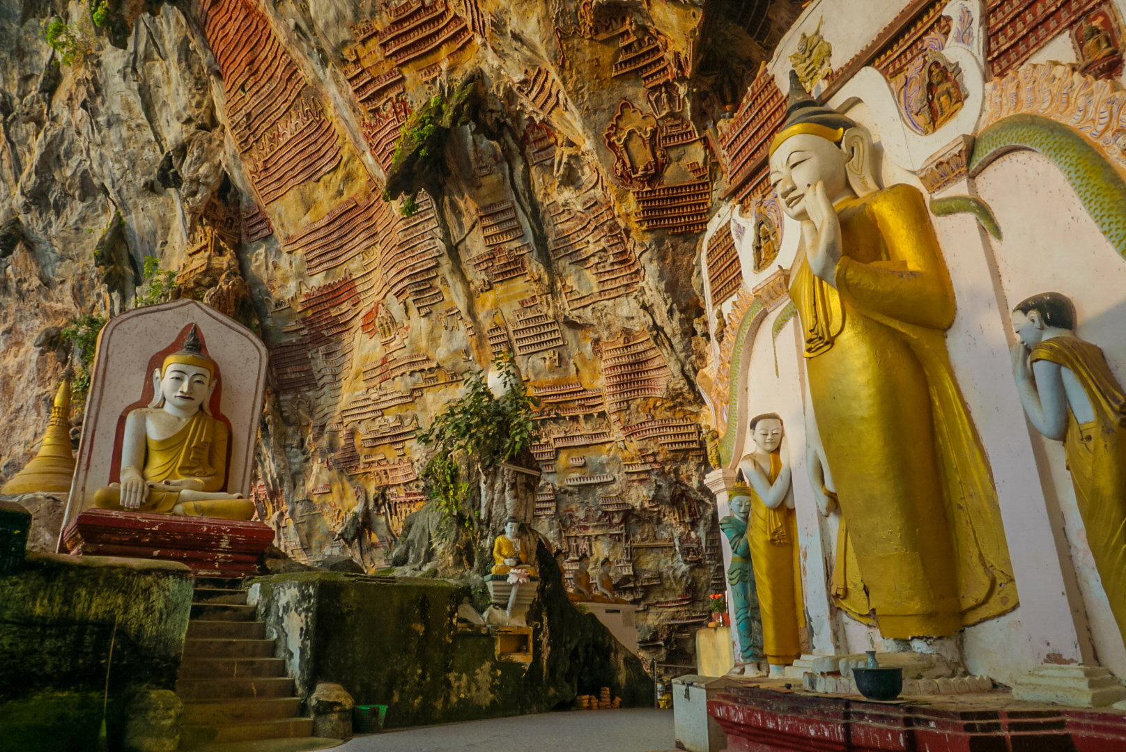 ေရွးေဟာင္းသမိုင္းဝင္လိႈဏ္ဂူ